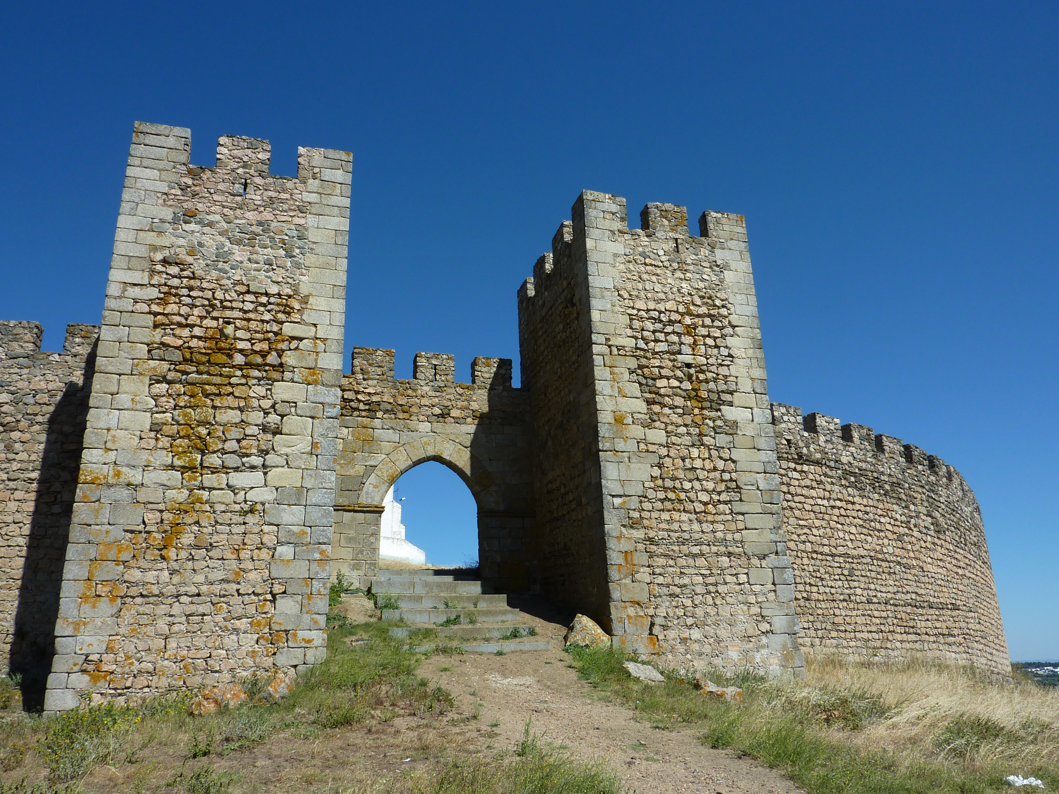 Castelo de Arraiolos - Porta de Santarém